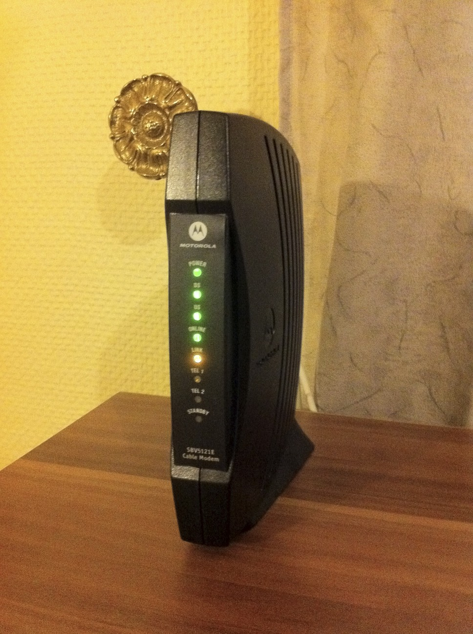 Kabelmodem Motorola SBV5121E